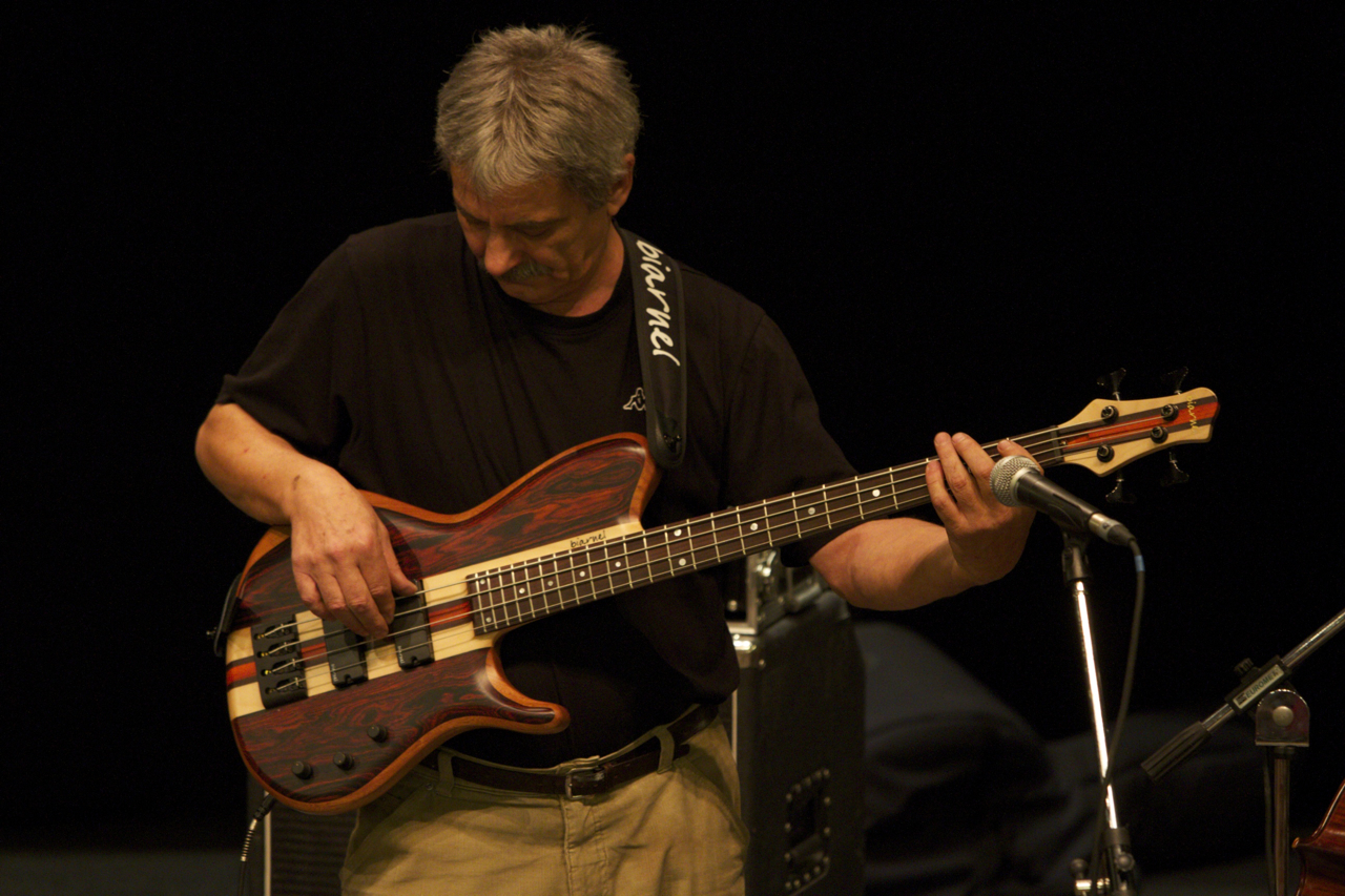 Ares Tavolazzi durante una esibizione di Area - Reunion Tour! a Pontedera (PI).